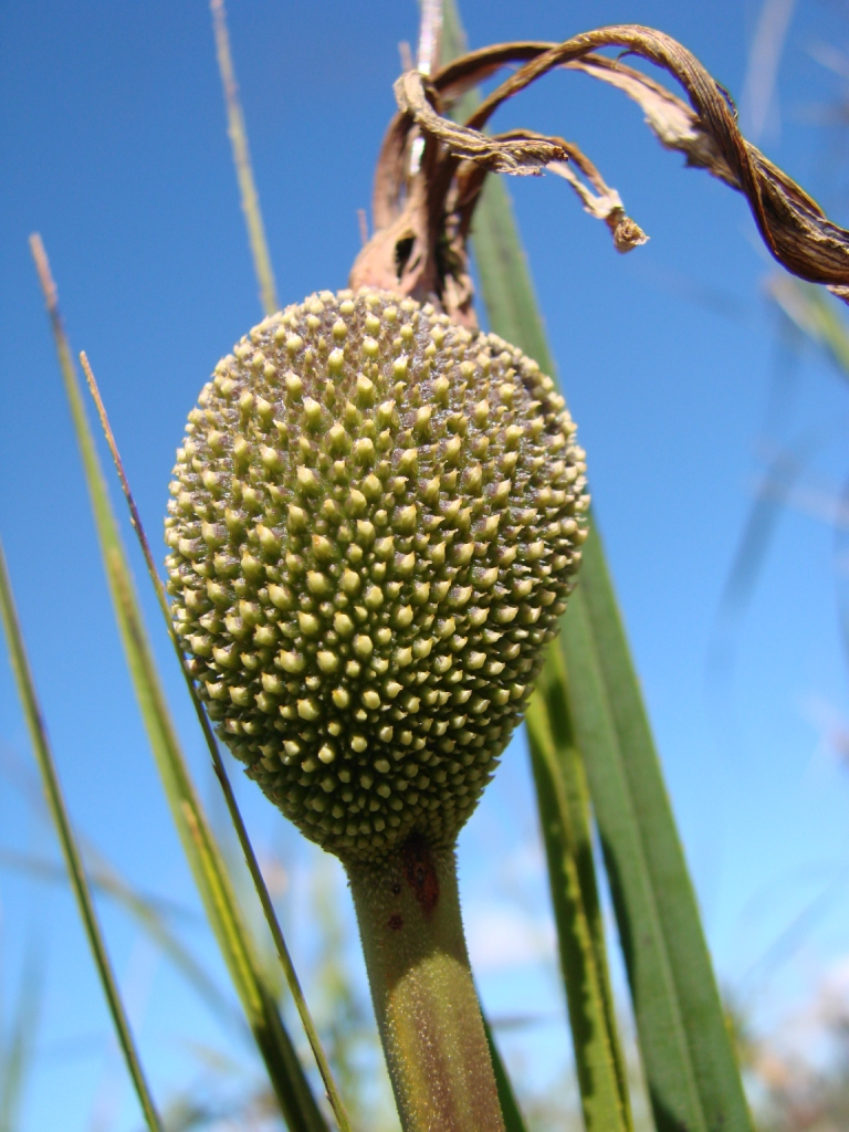 Vellozia flavicans (=Vellozia squamata), Velloziaceae - Brasilien/Brasil: Distrito Federal, Jardim Botanico de Brasília